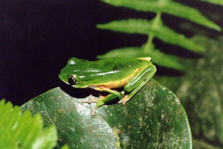 Phyllomedusa distincta, espécie que ocorre na Mata Atlântica de Santa Catarina